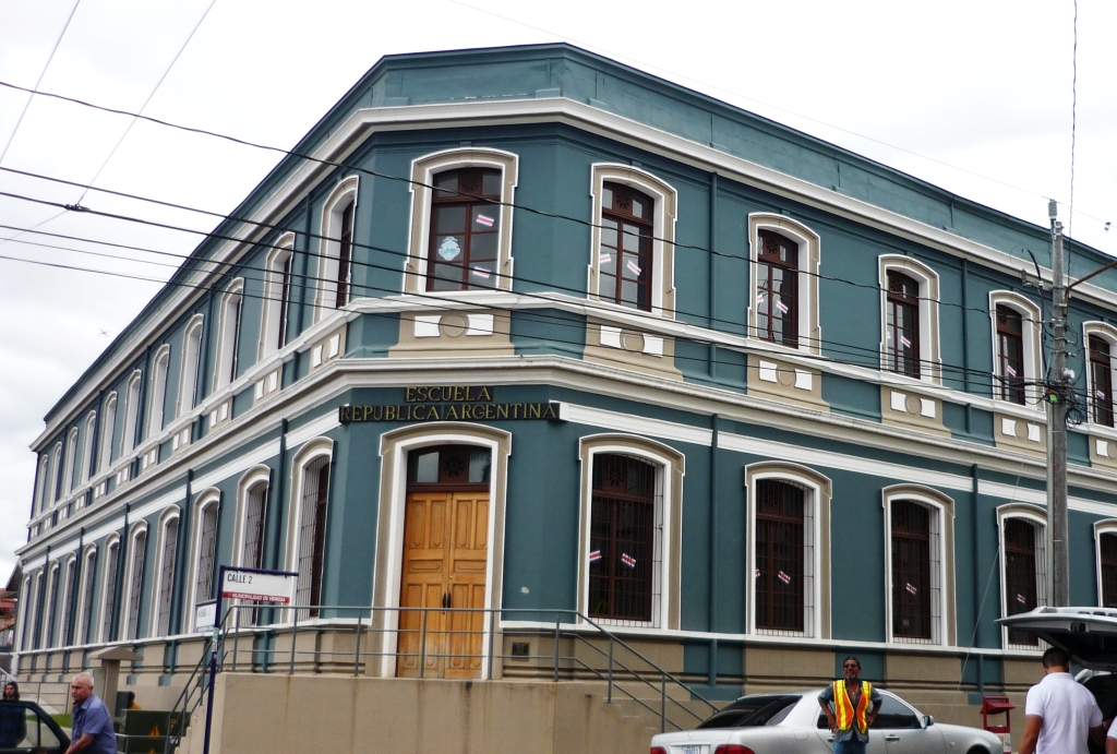 Edificio de la Escuela República de Argentina, restaurado en el 2010 para un Centro Cultural